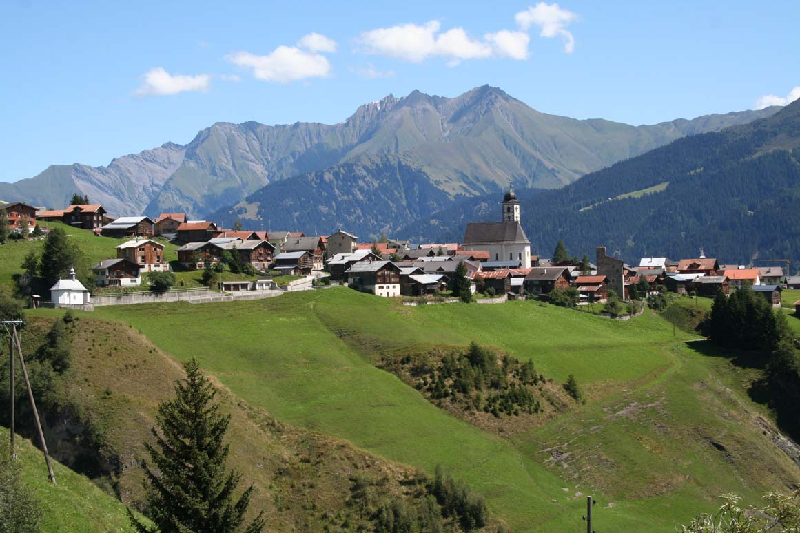 Lumbrein